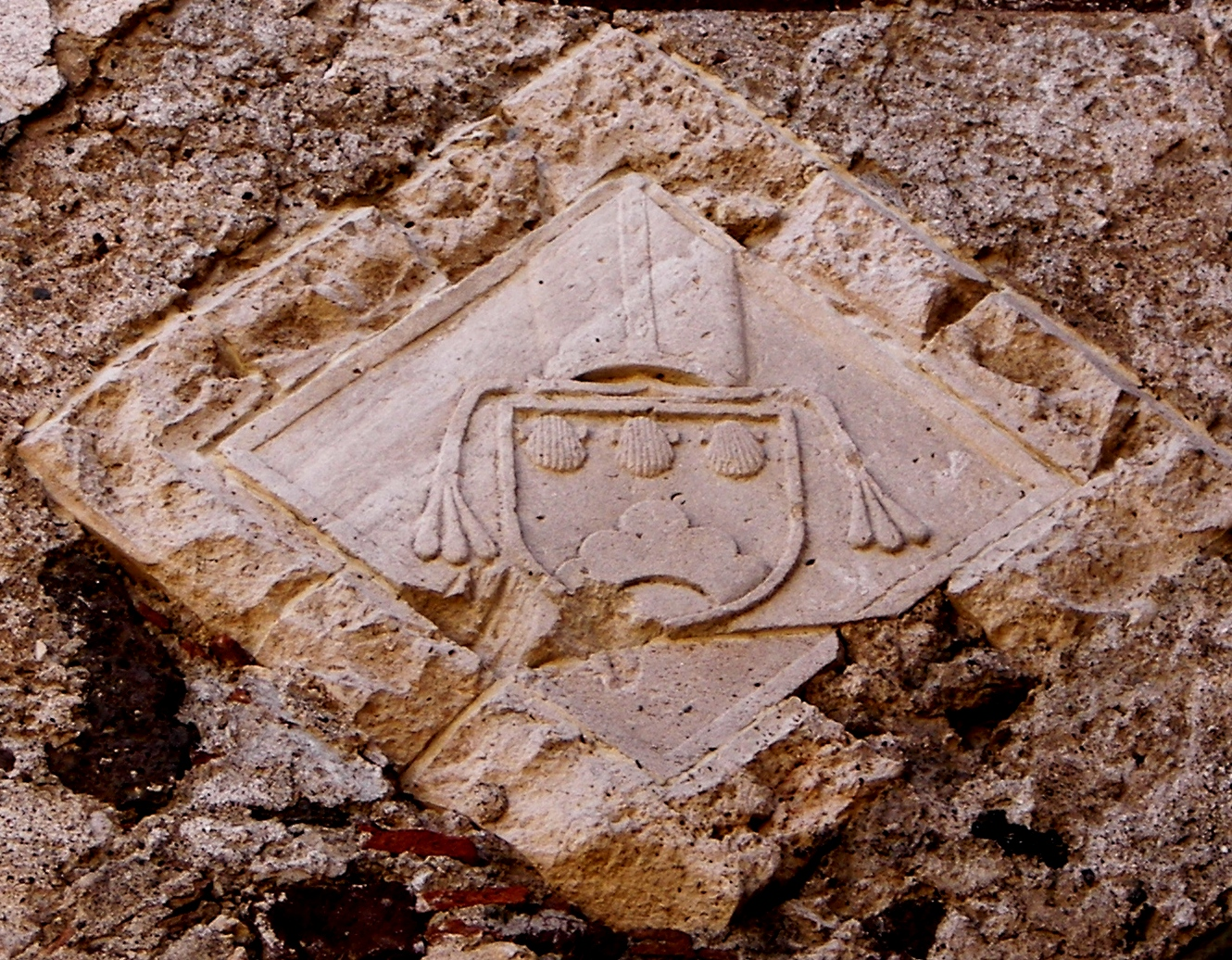 Stemma dell'Abate vescovo Platamaone, infisso sulla Torre Campanaria.